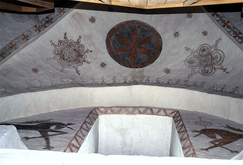 Roskilde Sankt Jørgensbjerg Kirke i Danmark. Kalkmalerier i tårnrummet